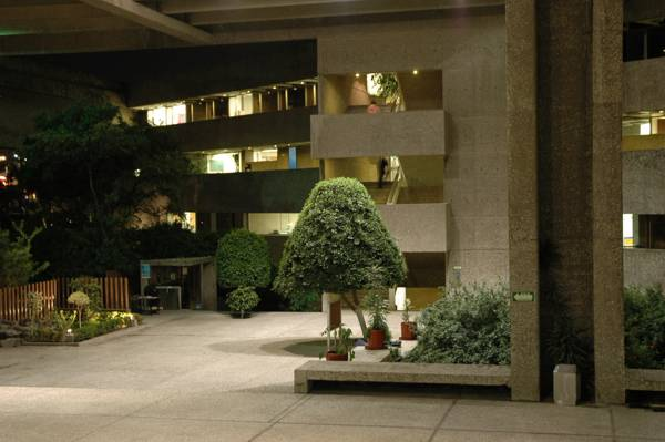 Imagen de El Colegio por la noche.